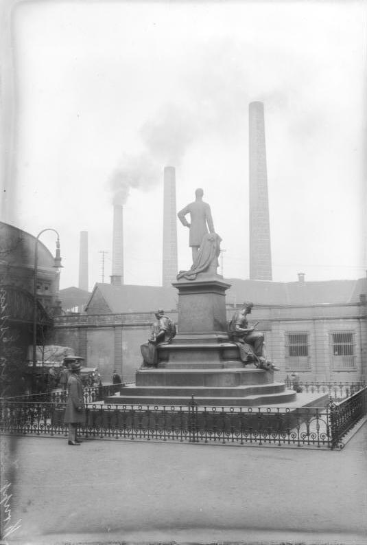 Zu dem großen Lohnkonflikt im Ruhrgebiert! Blick auf das Krupp-Denkmal mit den stillgelegten Schloten der Kruppwerke in Essen.